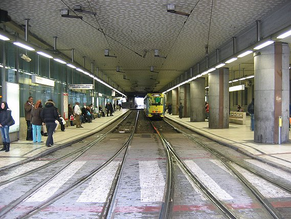 De 'overdekte' straat (bovengrondse tramhalte) in het station Brussel-Zuid.